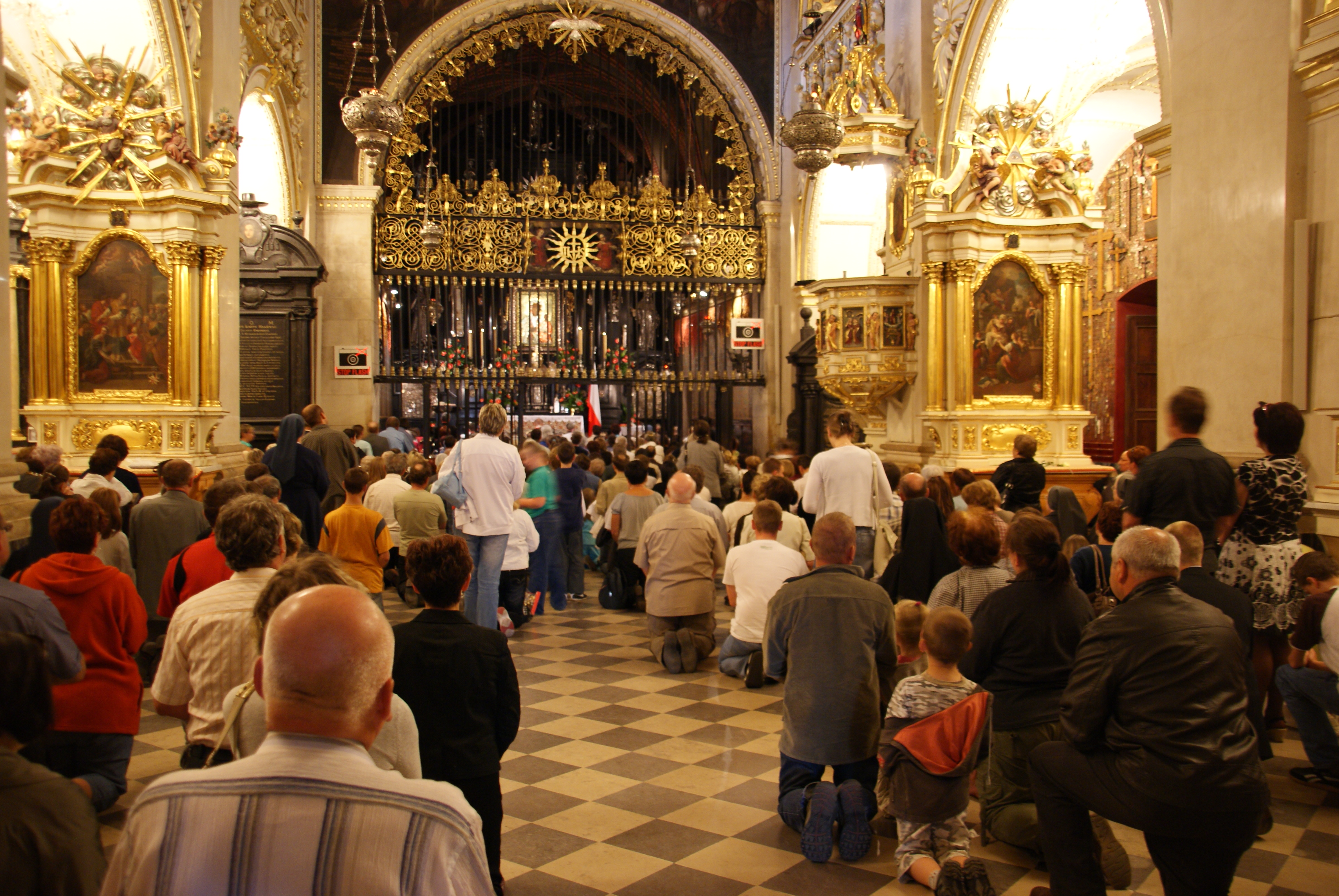 Chapel of Our Lady of Częstochowa in Jasna Góra.